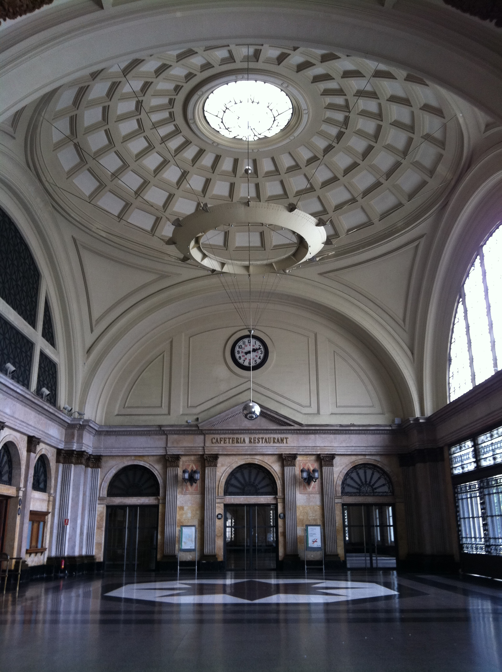 Hall de l'Estació de França